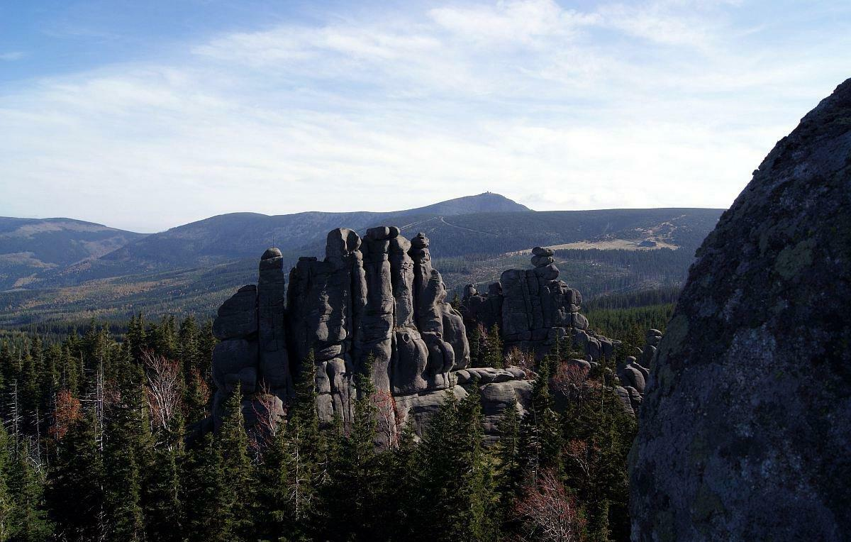 Pielgrzymy i widok na Karkonosze.